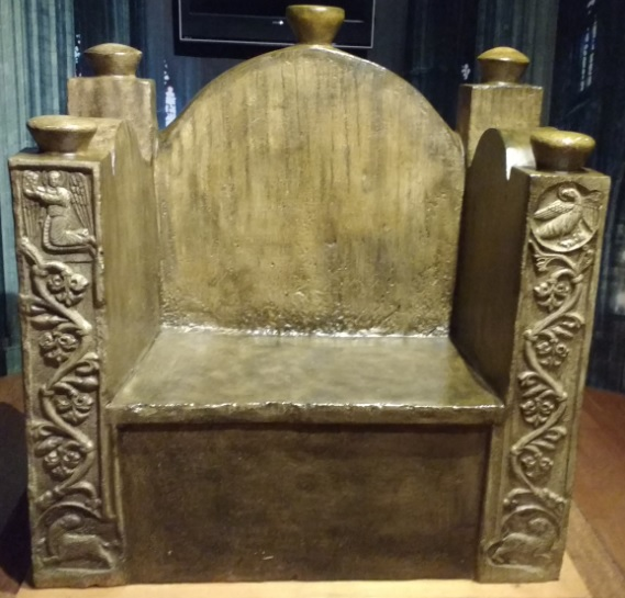 Còpia en guix de la cadira de Carlemany. Museu d'Història de Girona